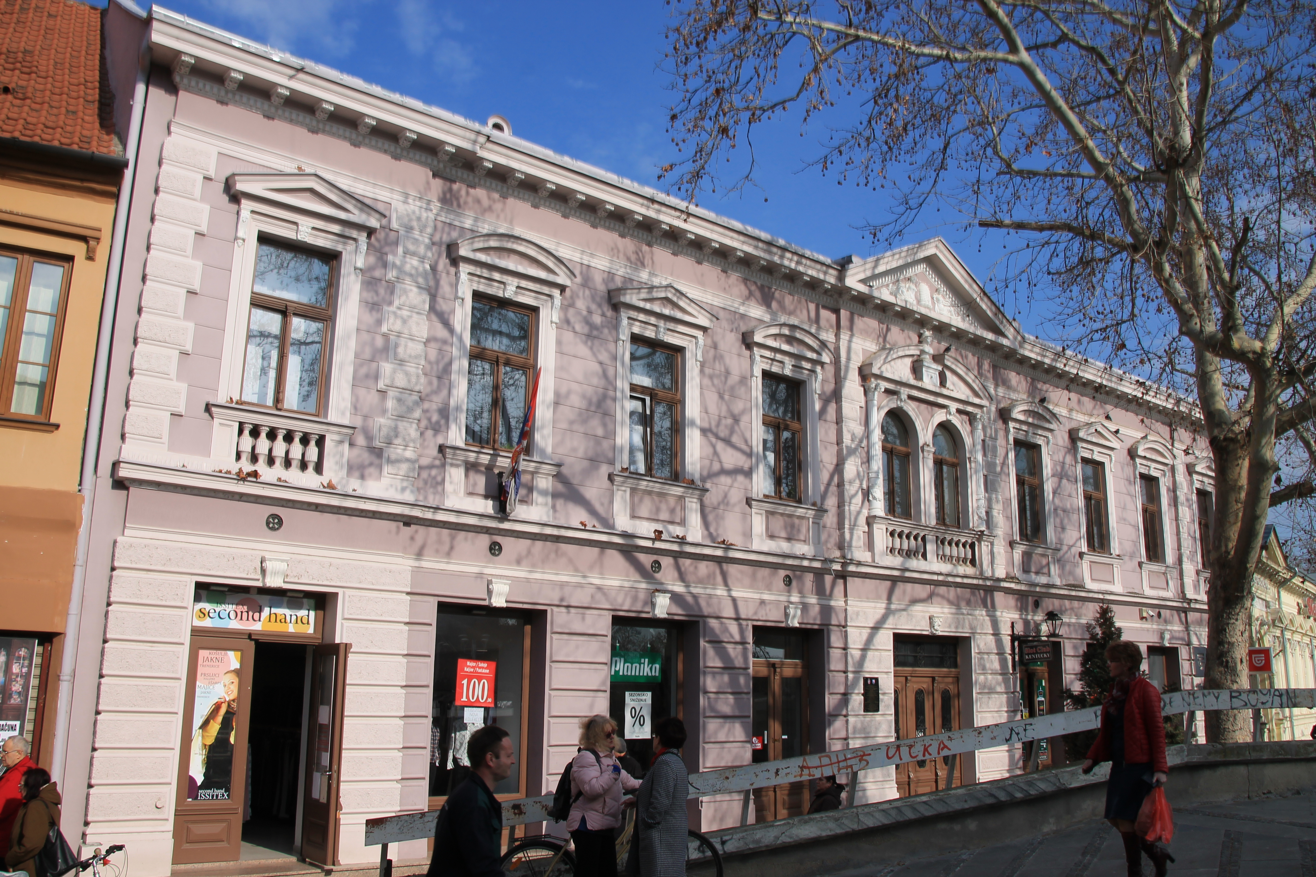 Staro jezgro Zrenjanina